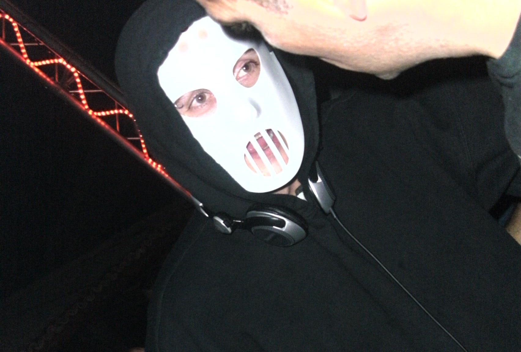 Angerfist